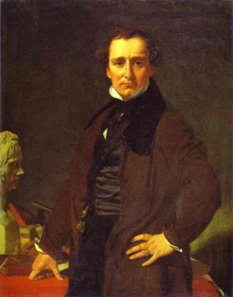 Portrait of sculptor Lorenzo Bartolinilabel QS:Len,"Portrait of sculptor Lorenzo Bartolini"label QS:Lit,"Ritratto dello scultore neoclassico Lorenzo Bartolini"